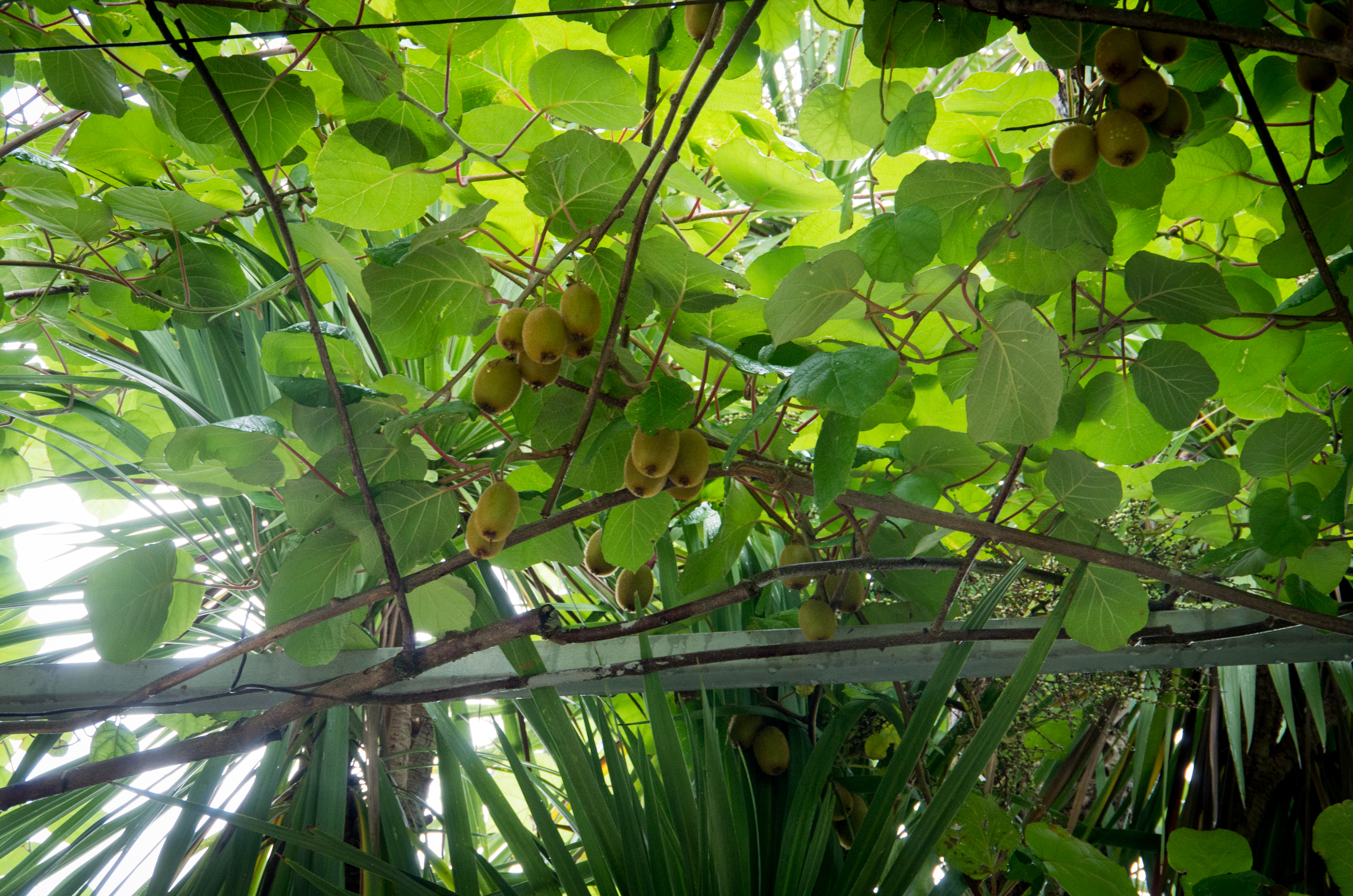 Дрэва ківі